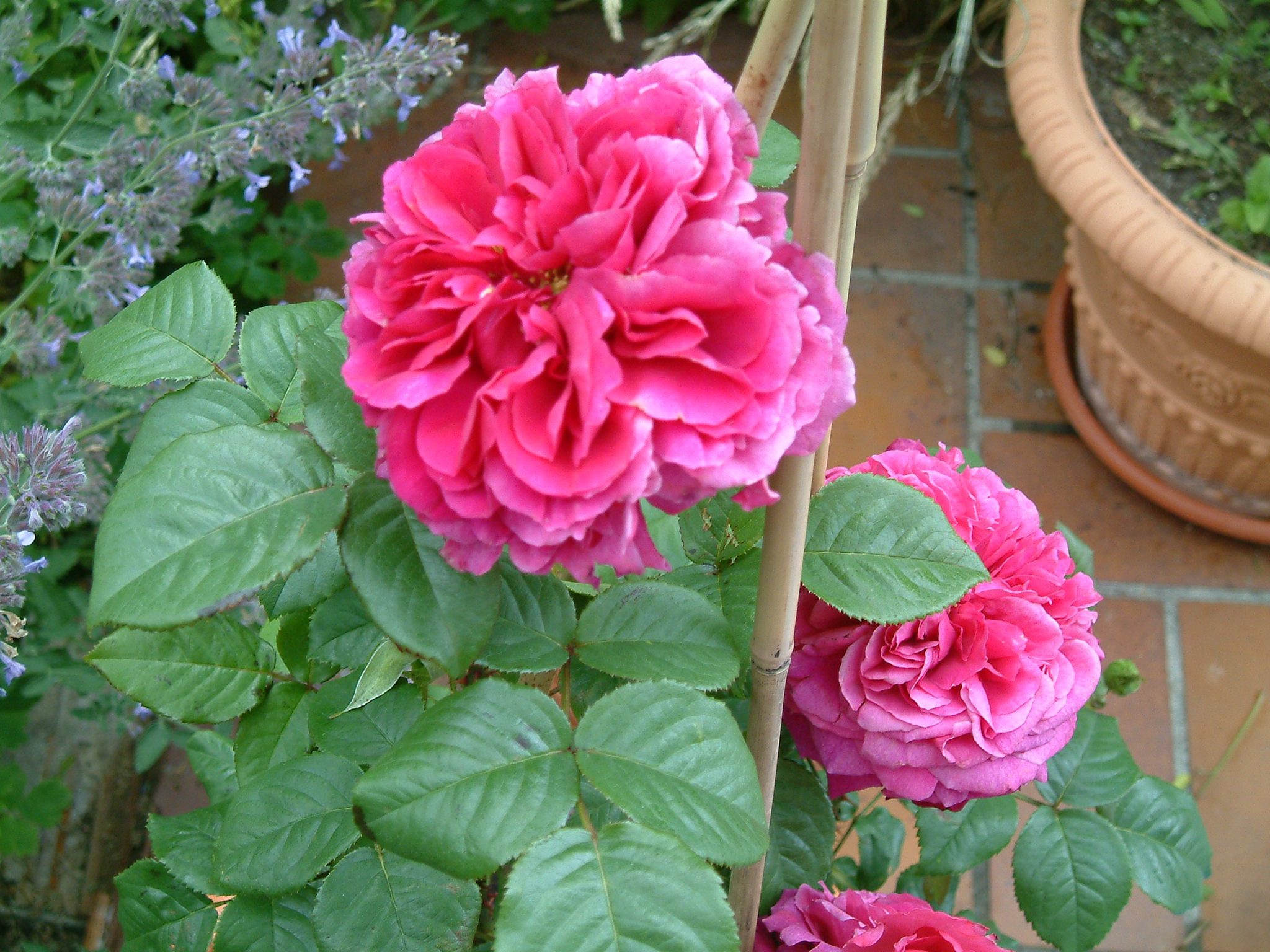 Rosa 'Fishermen's Friend'